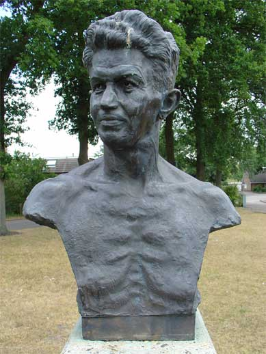 Foto van het borstbeeld Frits Slomp alias Frits de Zwerver (1898-1978) mede oprichter van de LO/LKP (1940-1945). Onderschrift : voor allen die ons een toekomst gaven. Het beeld uit 1995 staat in Hardenberg (Heemse).